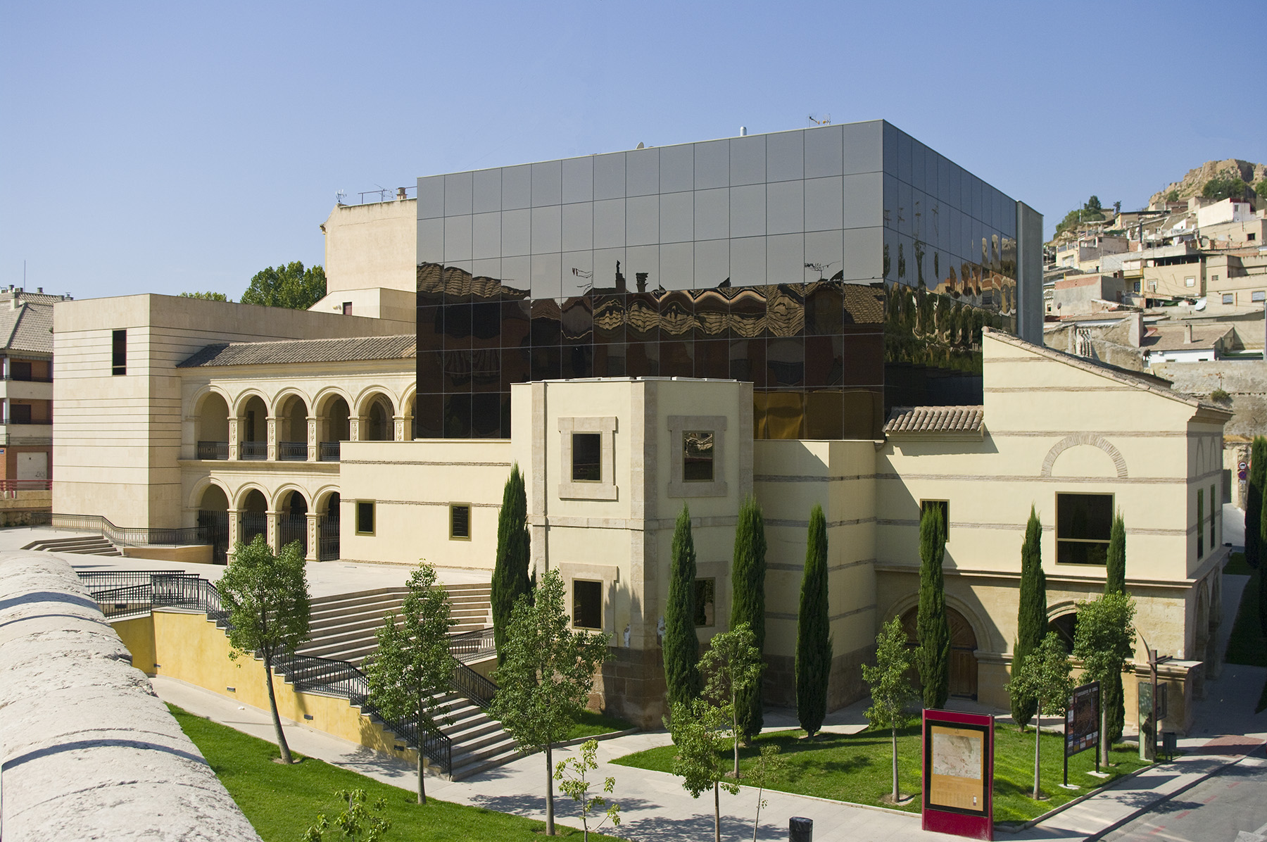 Antiguo Convento de la Merced en Lorca (Murcia)